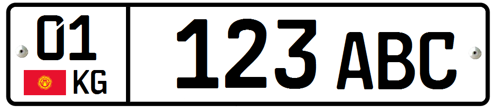 پلاک جدید جمهوری قرقیزستان